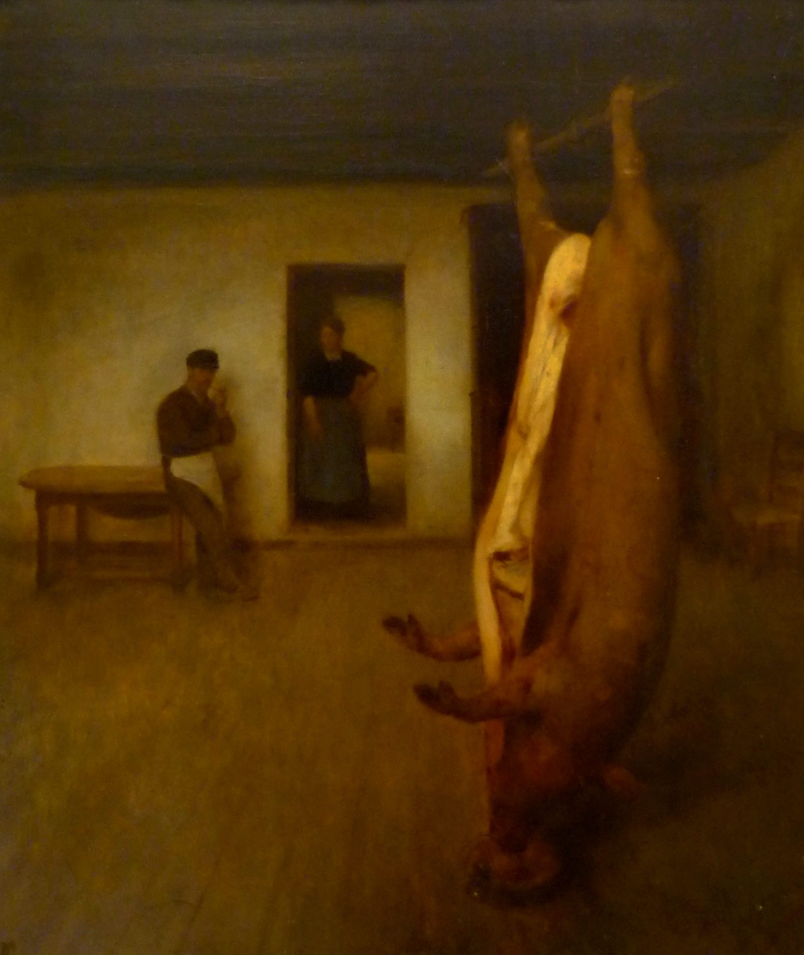 Léonard Jarraud : Le cochon, non daté. Musée d'Angoulême, Charente (France).